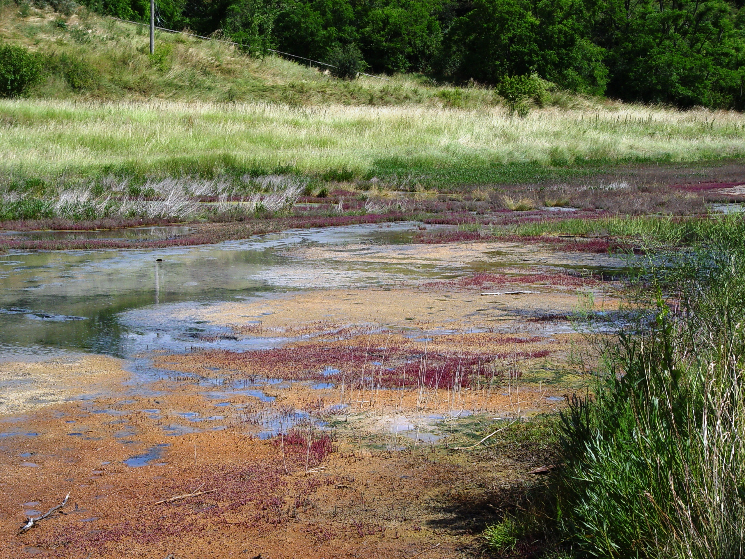 Salzwiese bei Sülldorf, Sachsen-Anhalt, Deutschland